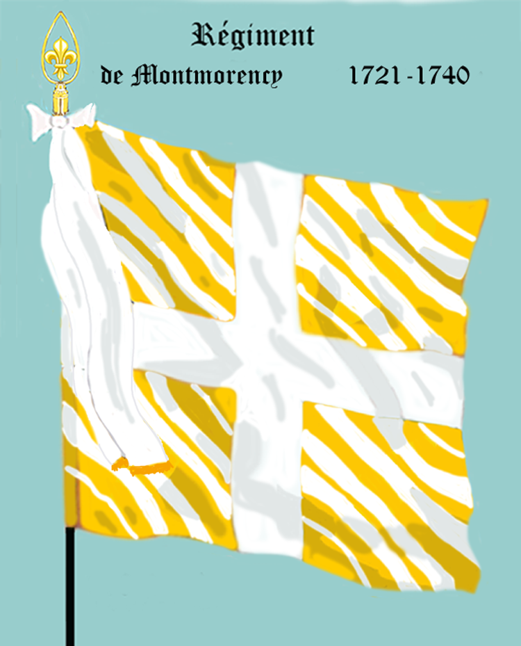 Ordonnanzfahne eines königlich französischen Infanterie-Regiments. - Entnommen und überarbeitet aus: „LES UNIFORMES ET LES DRAPEAUX DE L'ARMÉE DU ROI“ Marseille 1899. (Drapeau d'ordonnance d' un régiment française d'infanterie royale.)